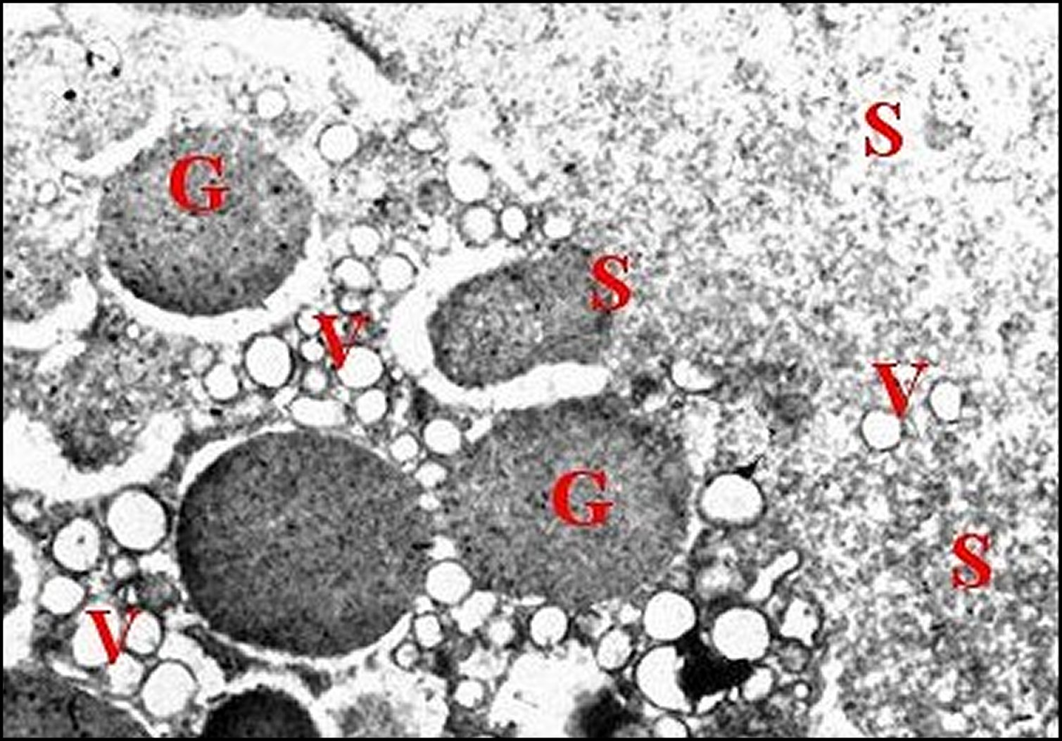 Autres pôles apicaux d'adénocytes prégonoporaux de Pholcus avec extrusion de vésicules et de sécrétion au microscope électronique